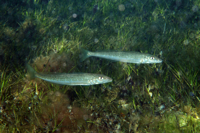 Sillaginodes punctata